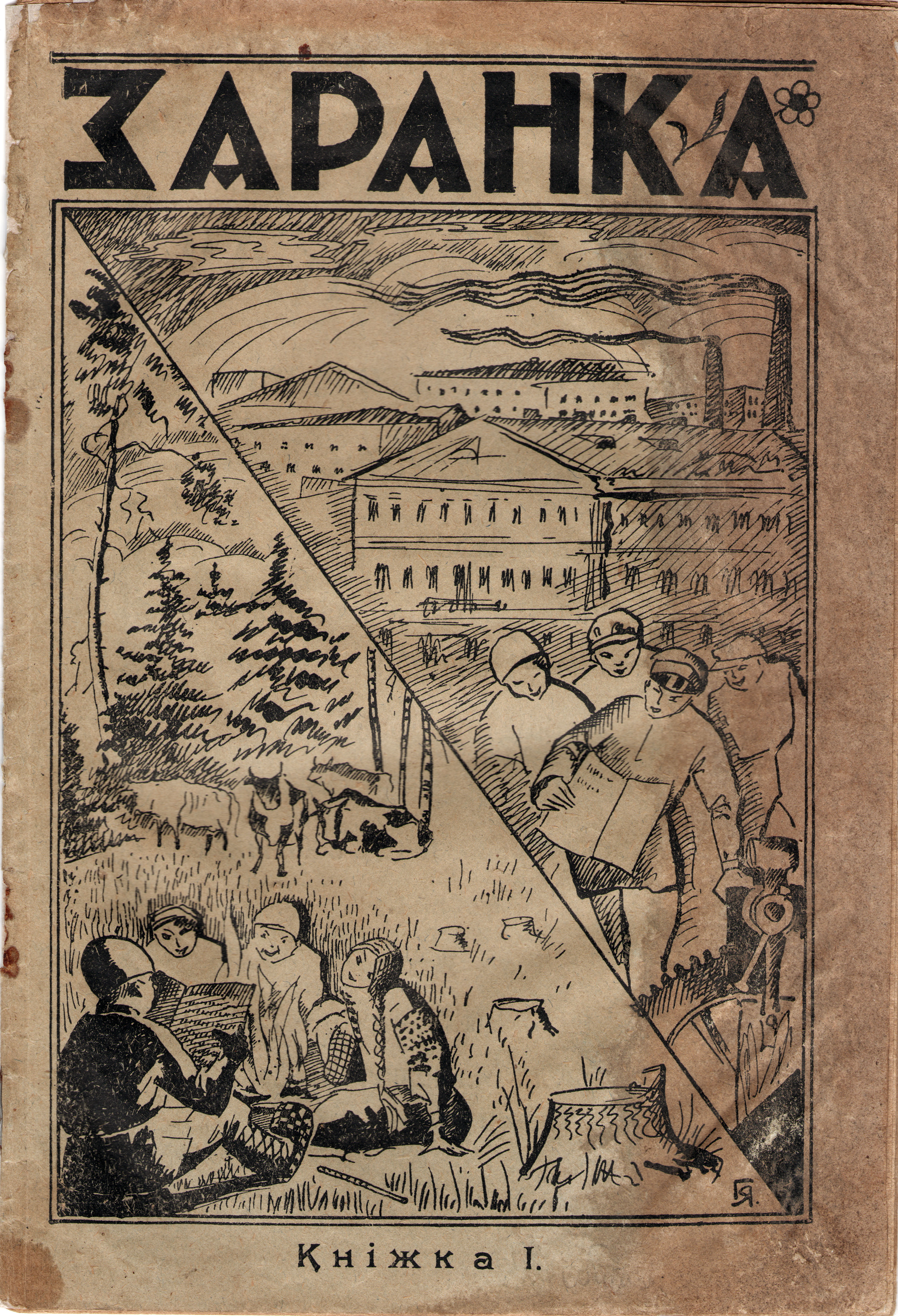 Беларуская (тарашкевіца): Заходнебеларускі часопіс "Заранка" №1, Вільня, рэдактар Зоська Верас, вокладка - Язэп Горыд